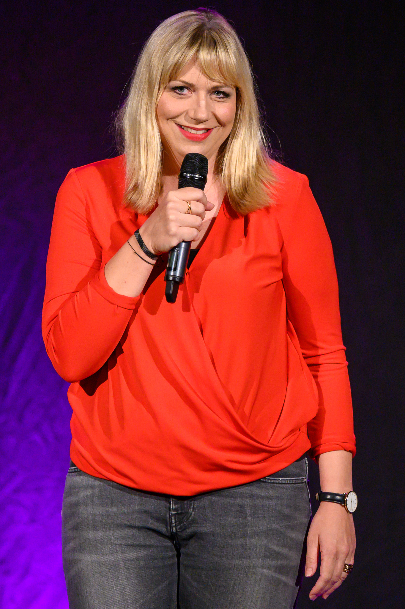 Comedy,Concertbüro Franken,Gutmann am Dutzendteich,Livecomedy,Mirja Regensburg,Mädelsabend